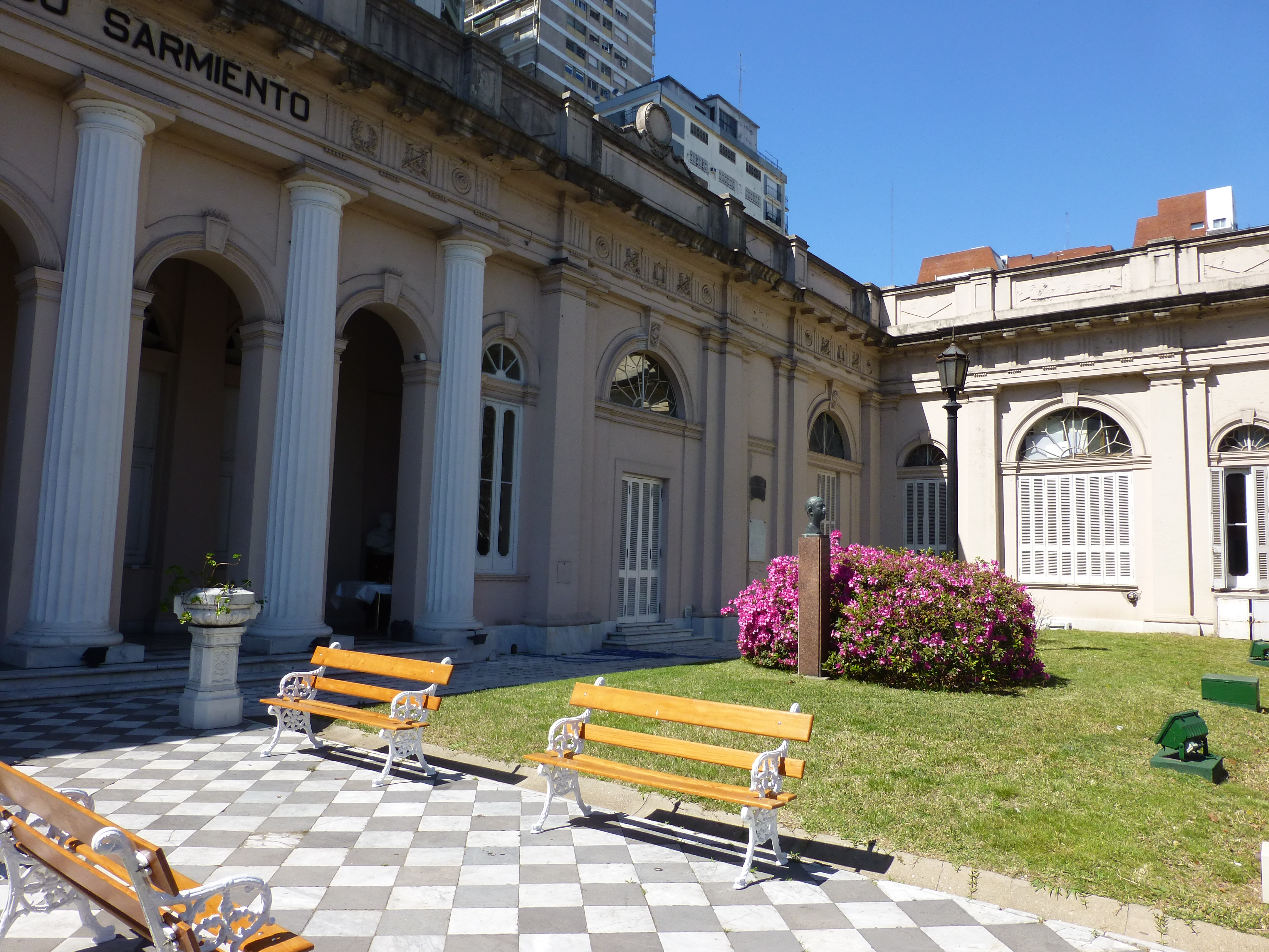 Patio exterior del Museo Histórico Sarmiento. Belgrano, Buenos Aires.